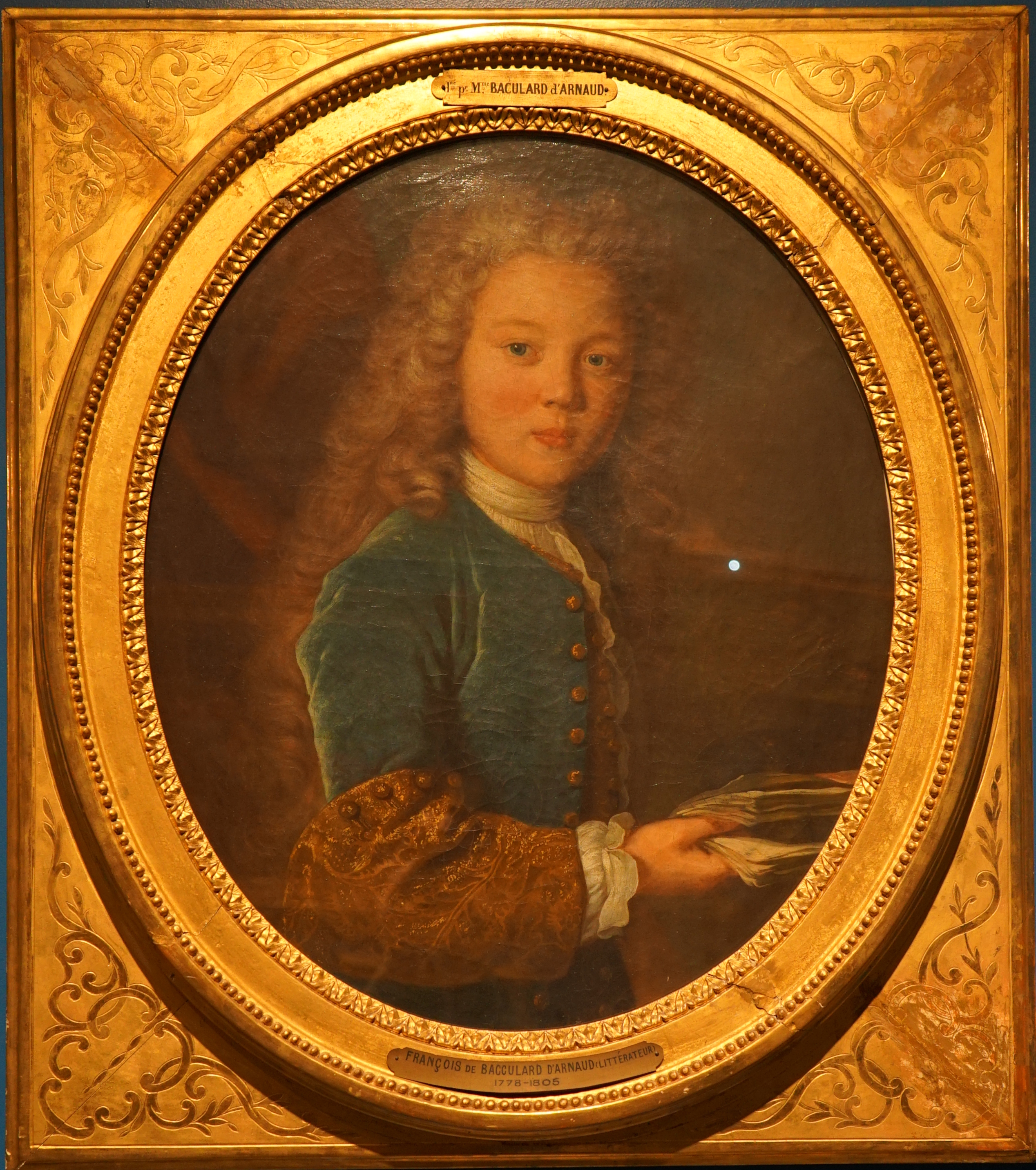 dans la salle de peintures.